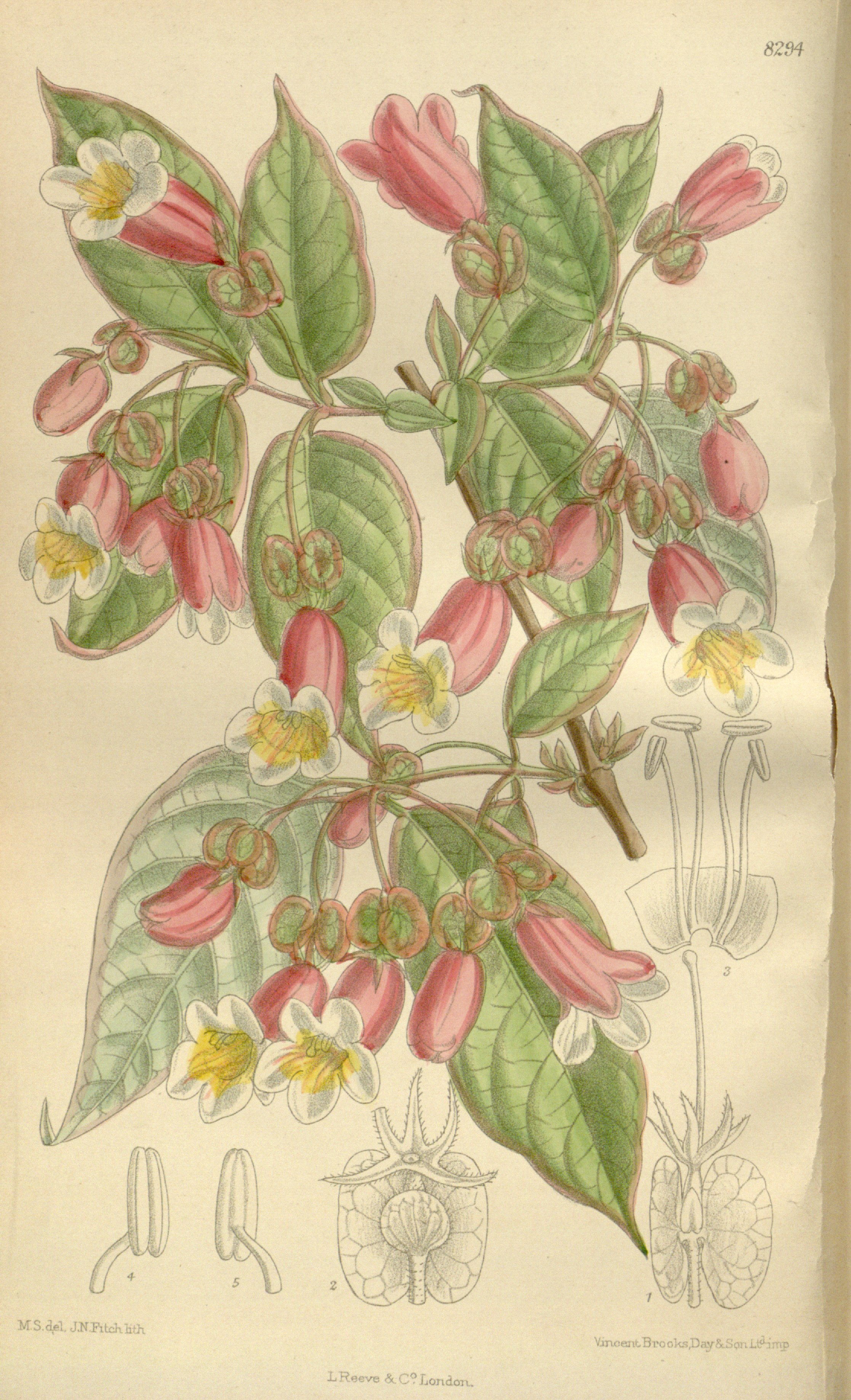 Dipelta ventricosa (= Dipelta yunnanensis), Linnaeaceae